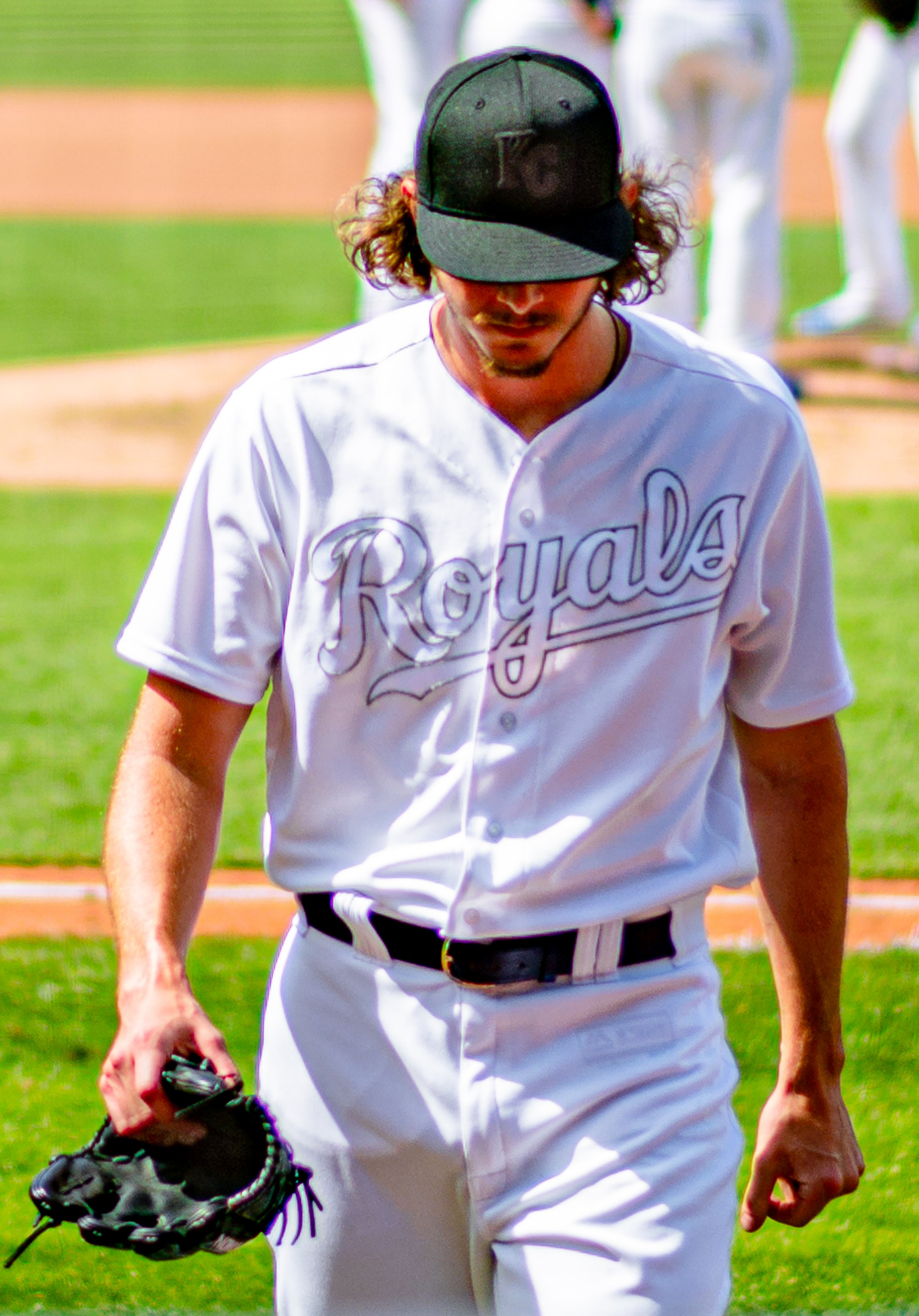 Kansas City Royals VS. Cleveland Indians